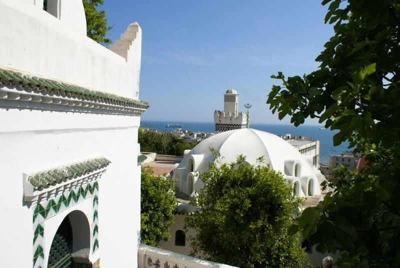 Mosquée Sidi Aberrahmane vue du mausolée du même nom. Le tout en face la mer.